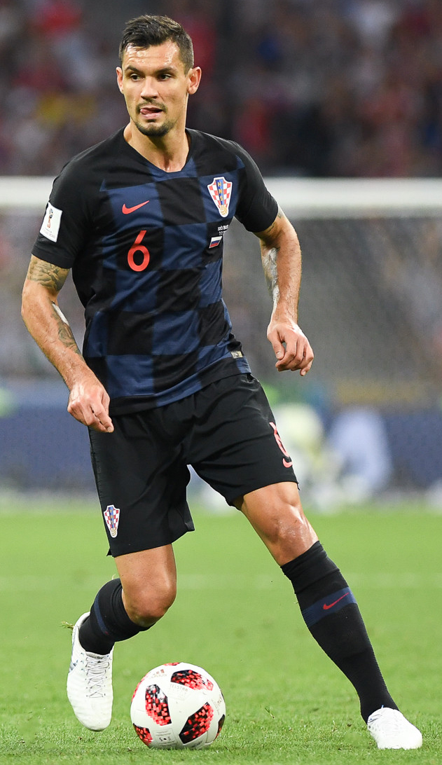 Сборная России заканчивает ЧМ-2018 с поднятой головой. Хорватия выходит в полуфинал